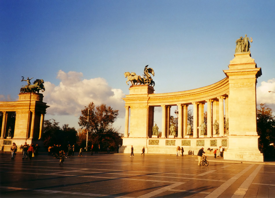 Heldenplatz in Budapest